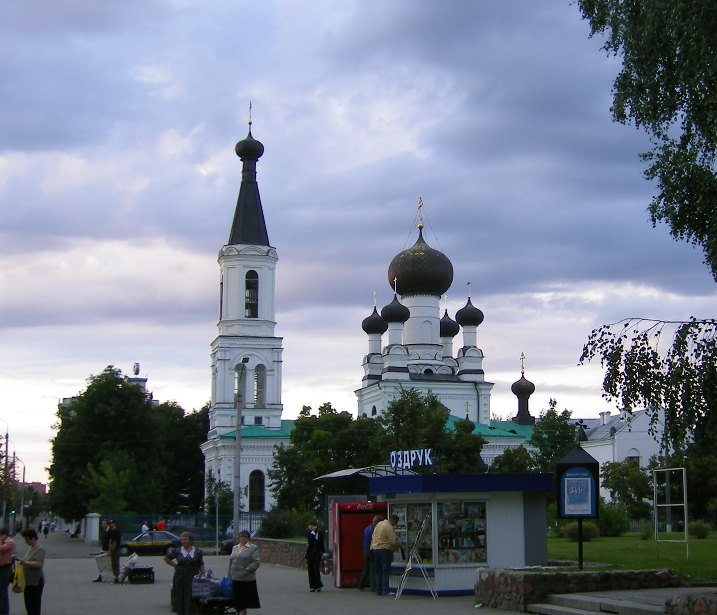 Собор Трёх Святителей